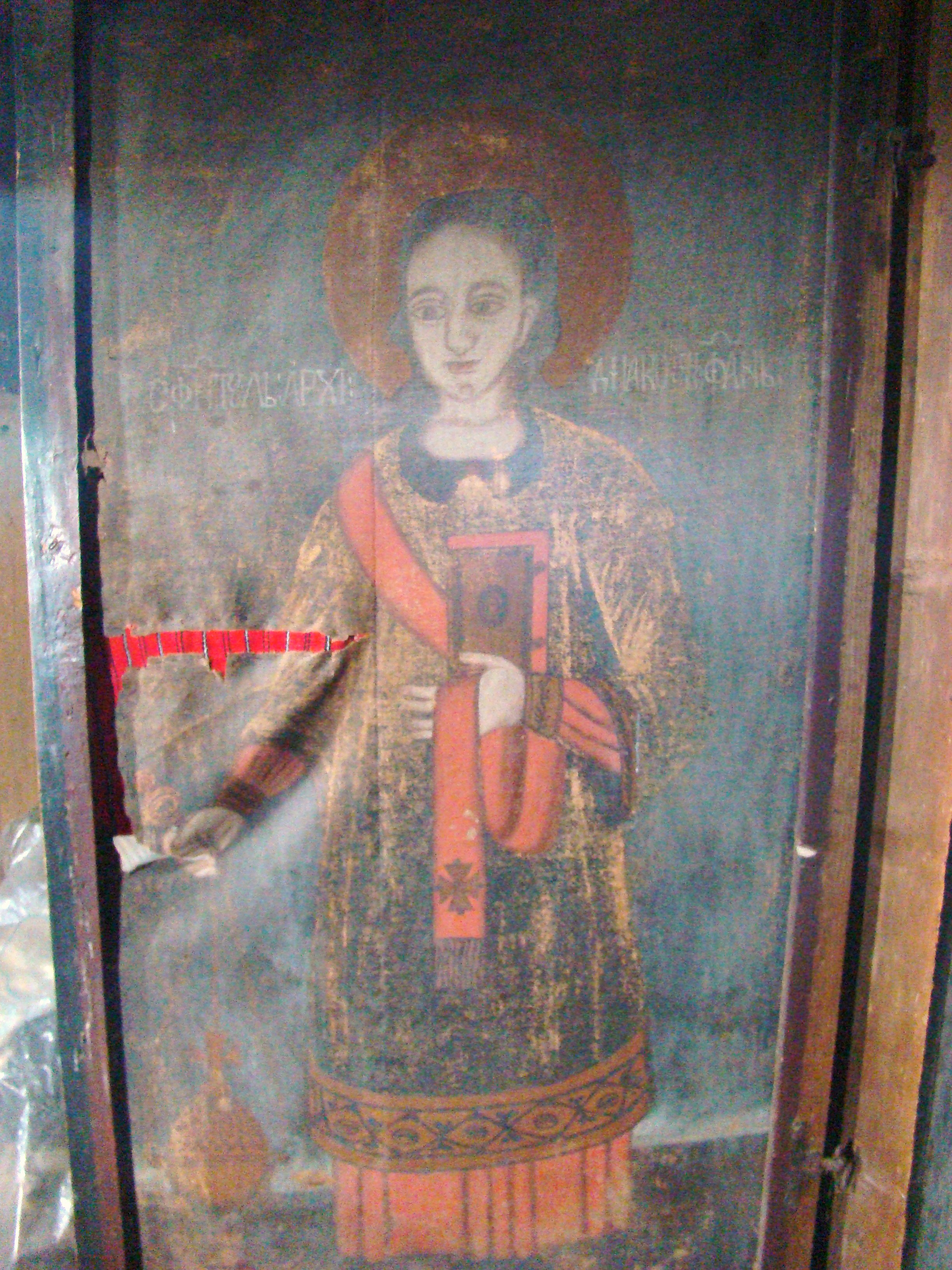 Biserica de lemn din Surduc, județul Bihor